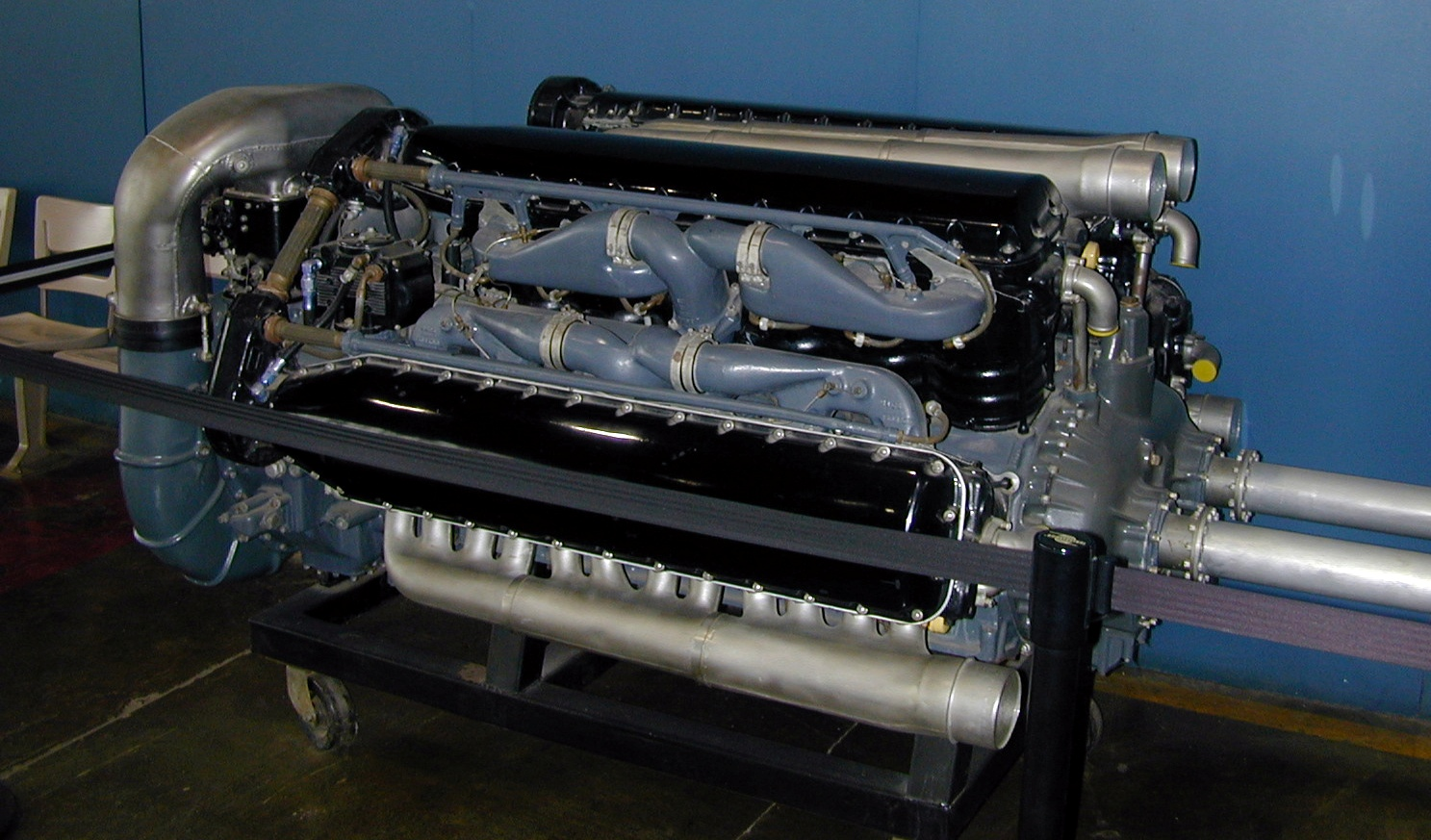 Allison V-3420 Engine